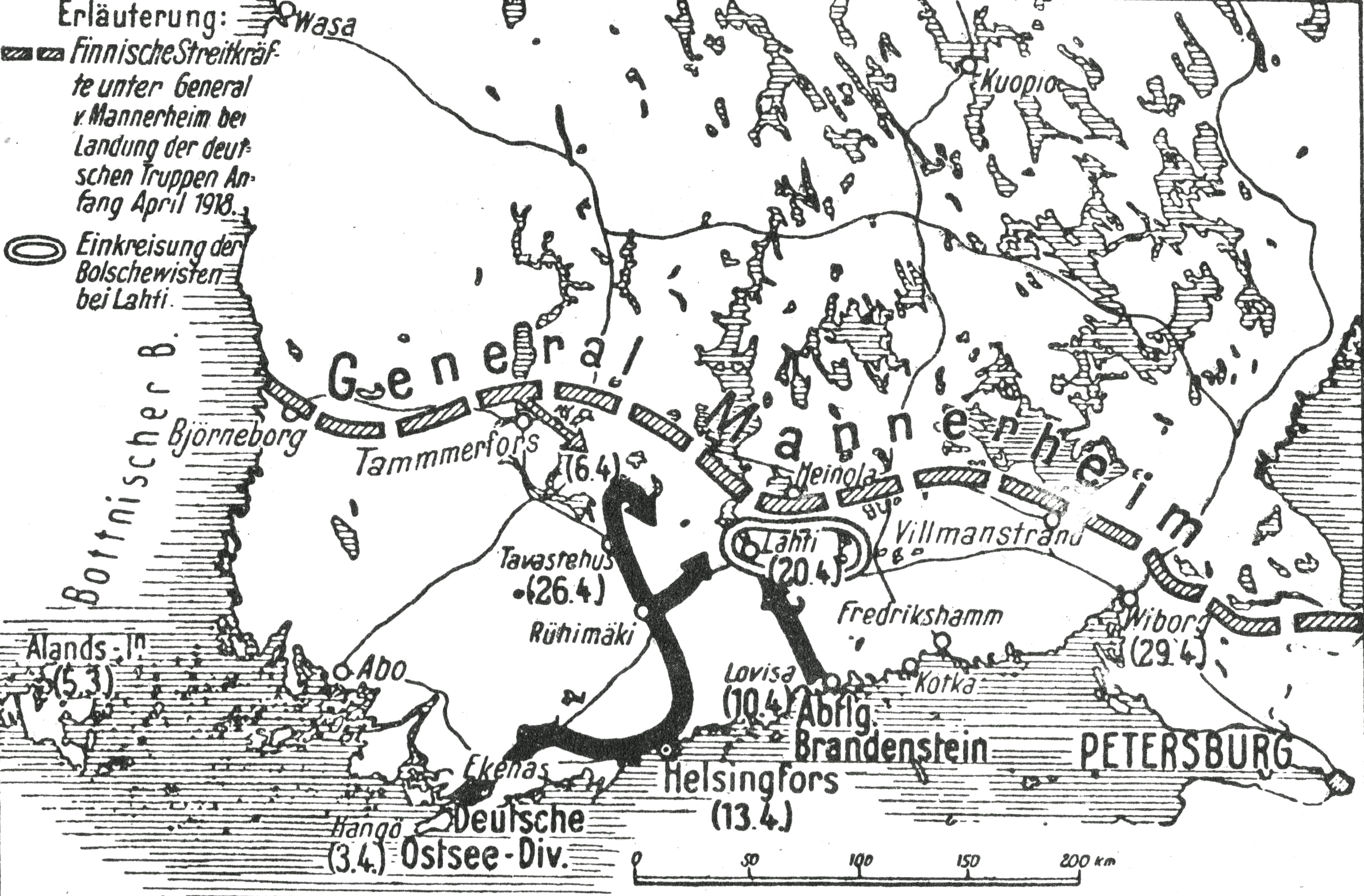 Die Expedition nach Finnland 1918.